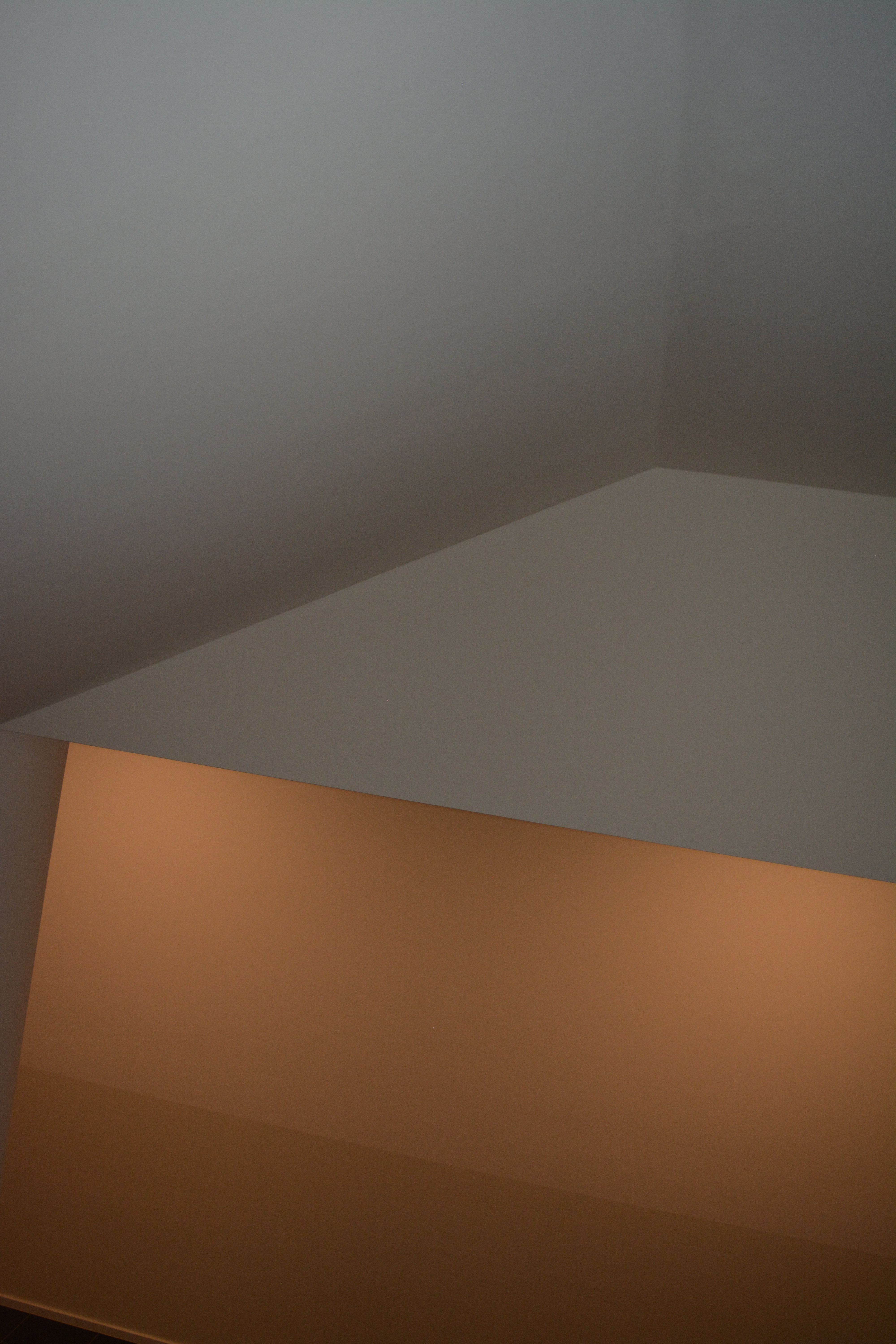 Durch Lichteinfall und Sonnenbestrahlung zu unterschiedlichen Tageszeiten verwandelt sich ein ansonsten kühler, sachlicher Raum wie eine Sinnestäuschung in etwas unvorhersehbares Neues.